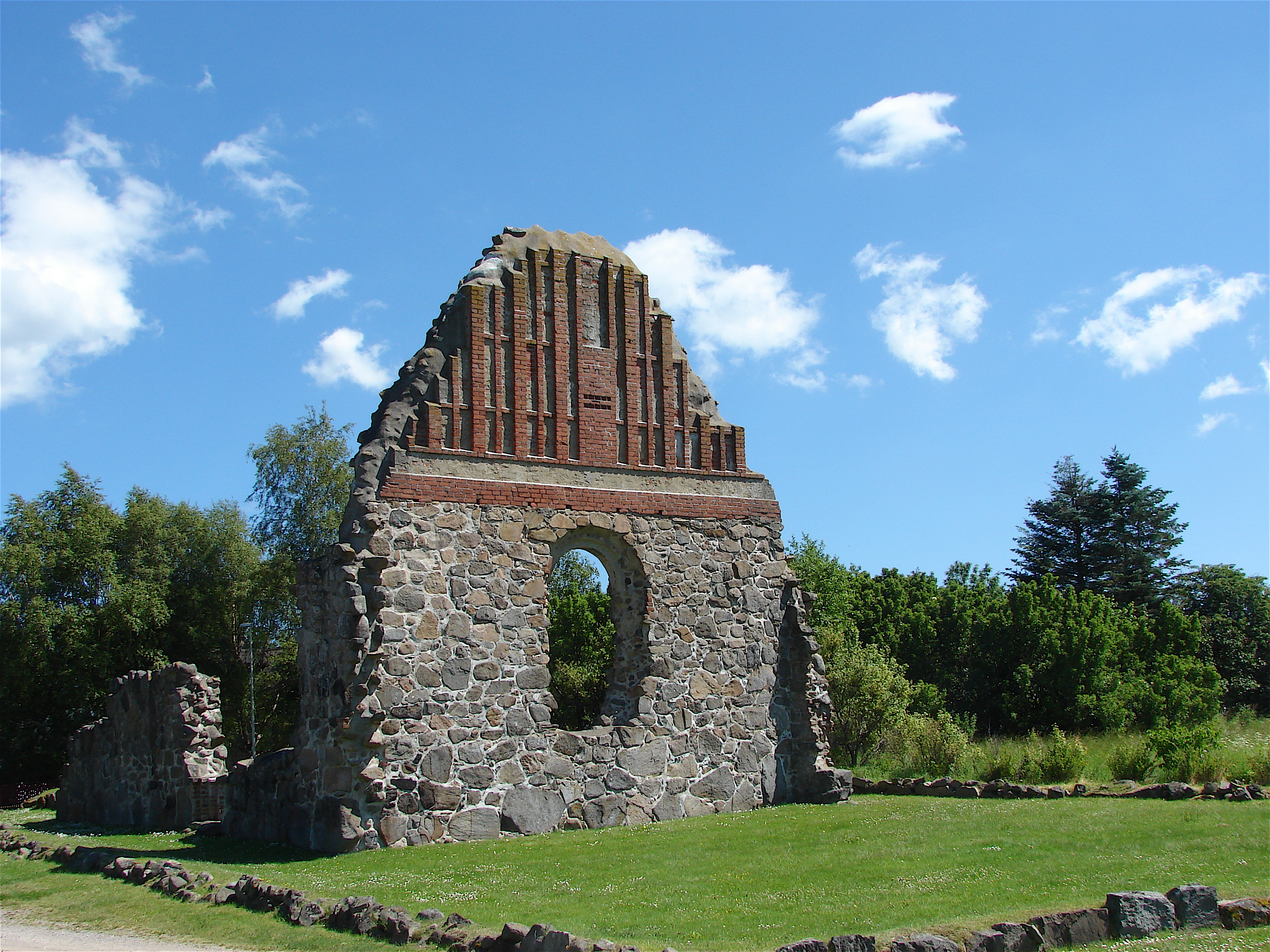 Sankt Gjertrud Kapel, Væ, Vä, Whæ, ruins, ruiner